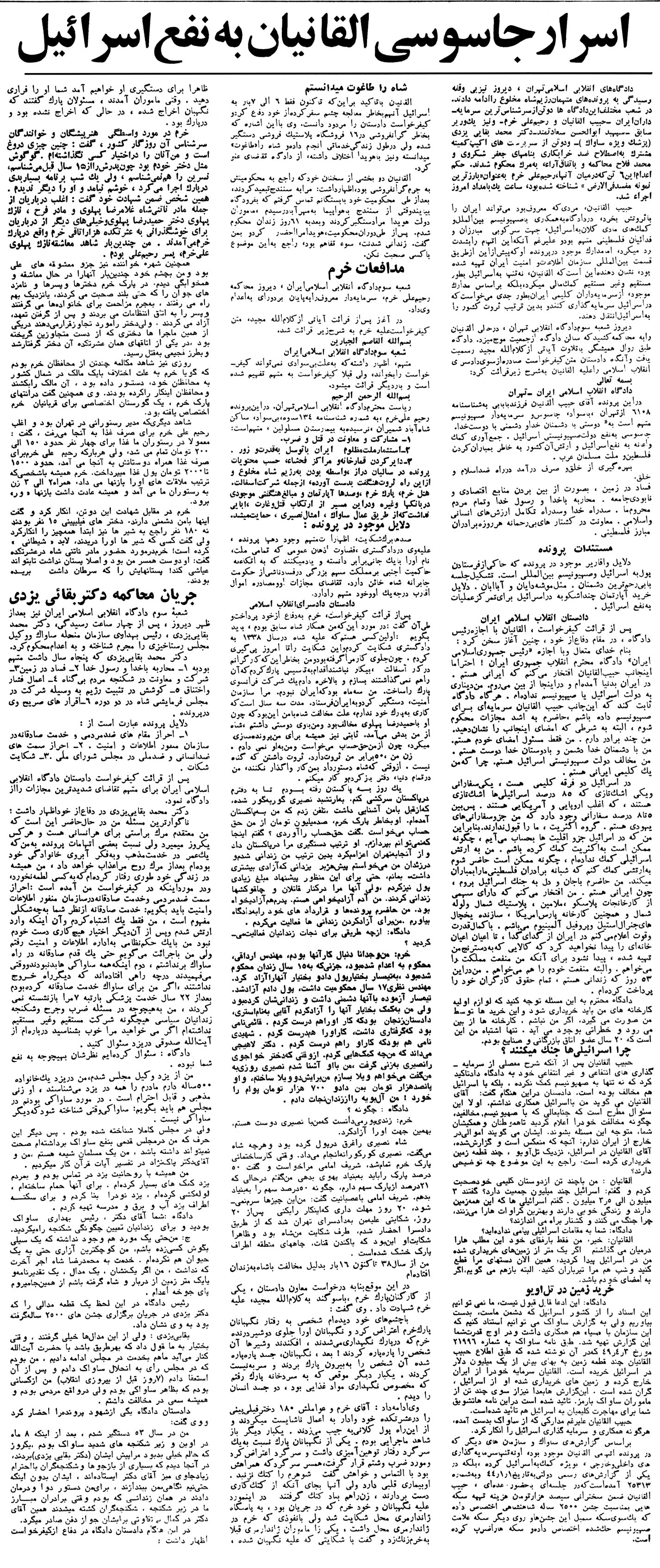 گزارش محاکمه حبیب‌الله القانیان در روزنامه اطلاعات